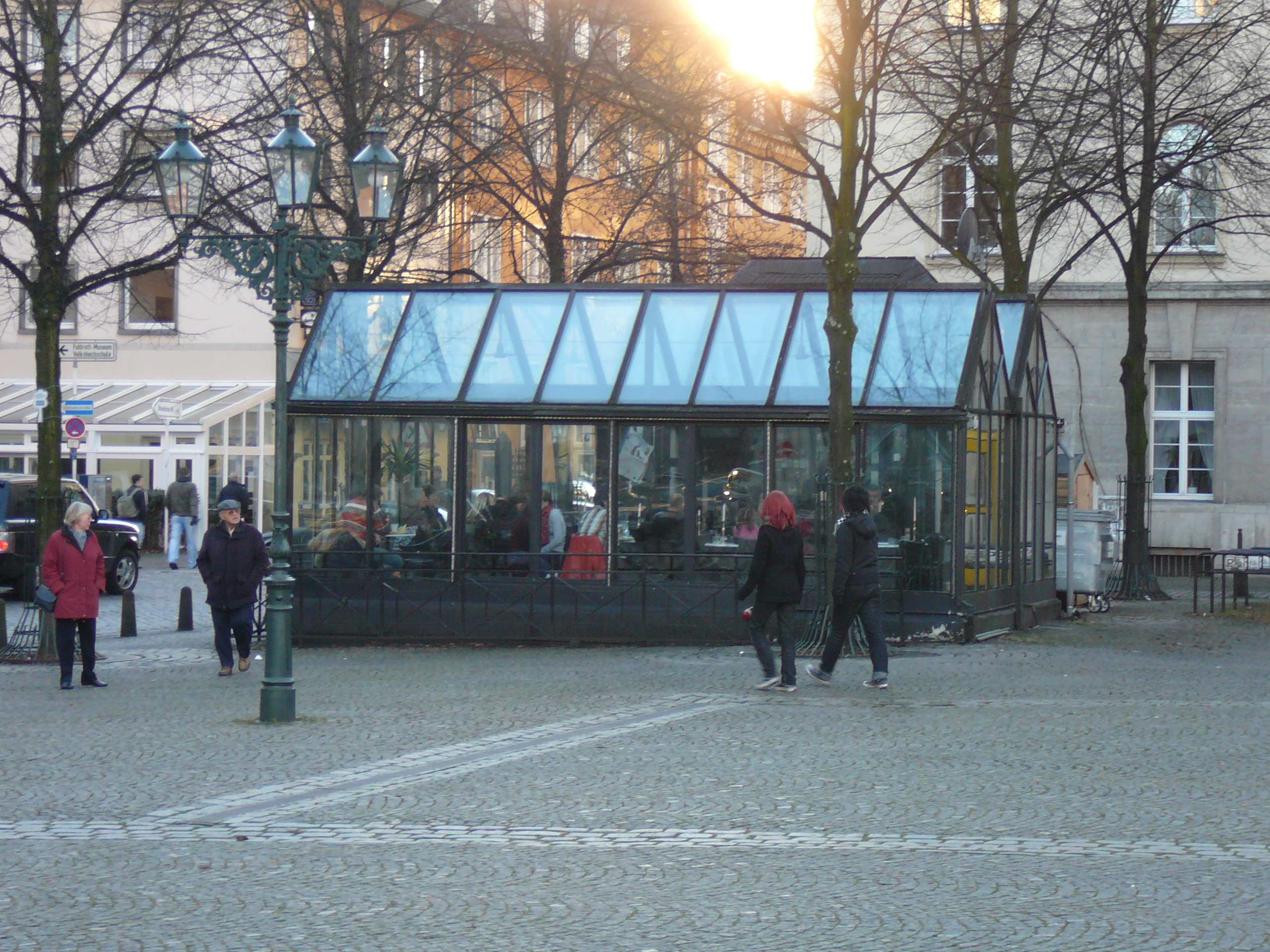 Laurentisplatz, Wuppertal